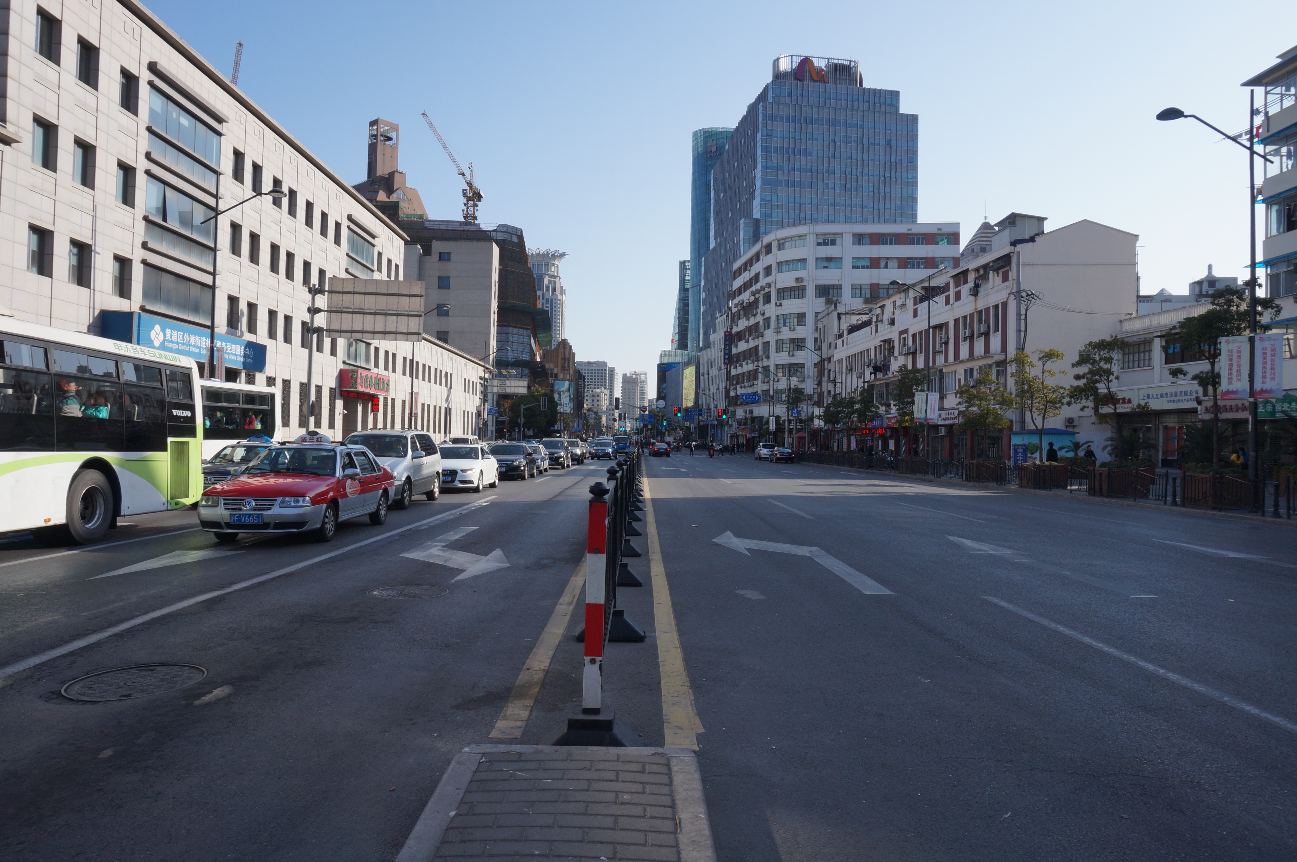 上海河南中路街景